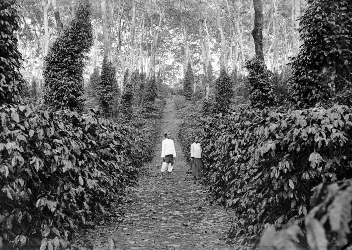 Negatief. Java koffiestruiken onder dadap met peperranken op een onderneming